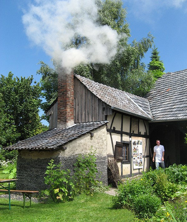 Das „Backes“ (Backhaus) in Wülscheid, Aegidienberg This image shows a heritage building in Germany, located in the North Rhine-Westphalian city Bad Honnef (no. A 266).